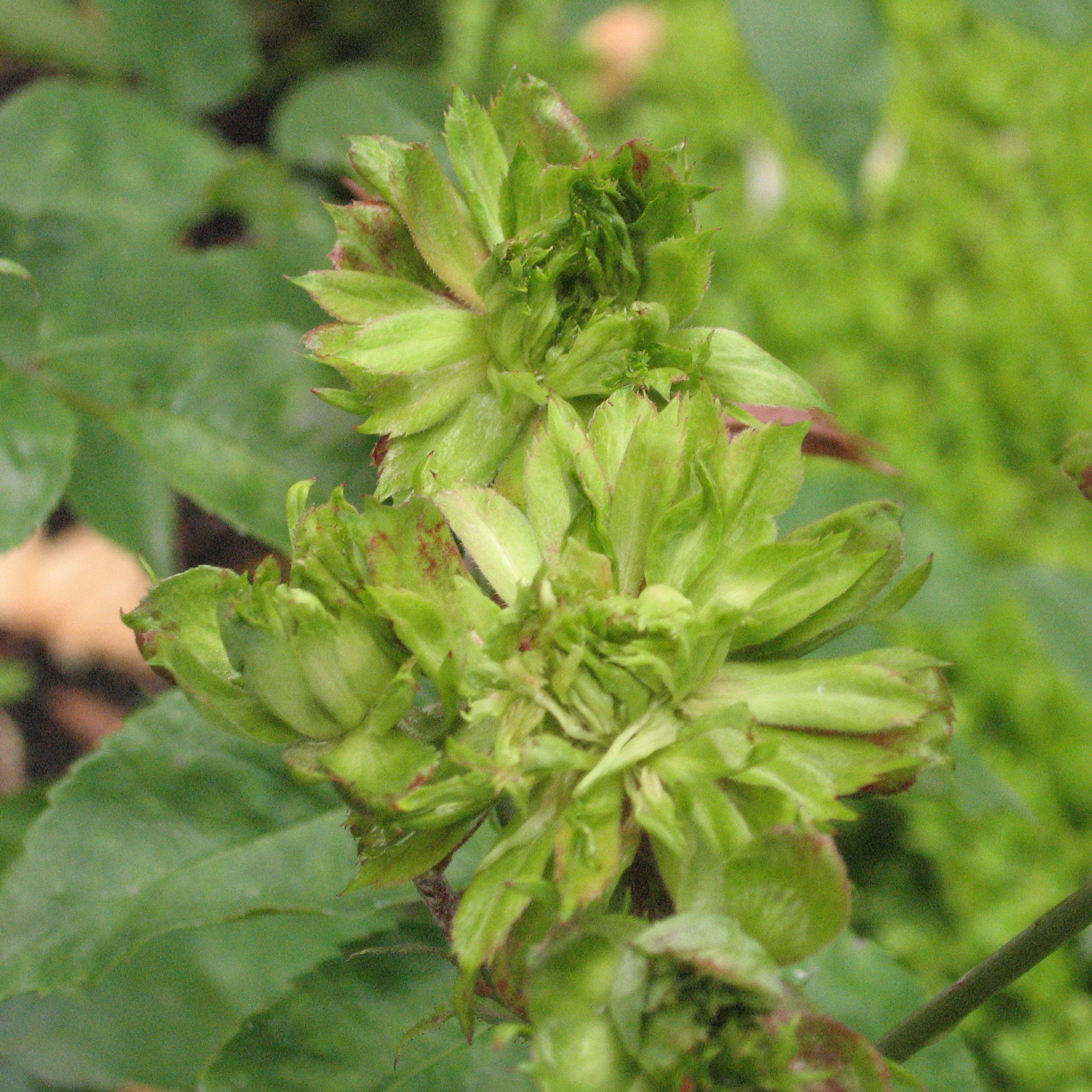 Rosa 'Viridiflora', sect. Chinensis. Real Jardín Botánico, Madrid